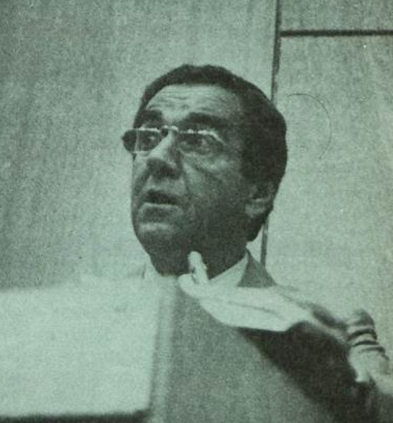 O Ministro das Comunicações Haroldo Corrêa de Matos durante o Seminário Internacional de Marketing e Comunicação Social do Sistema Telebrás.